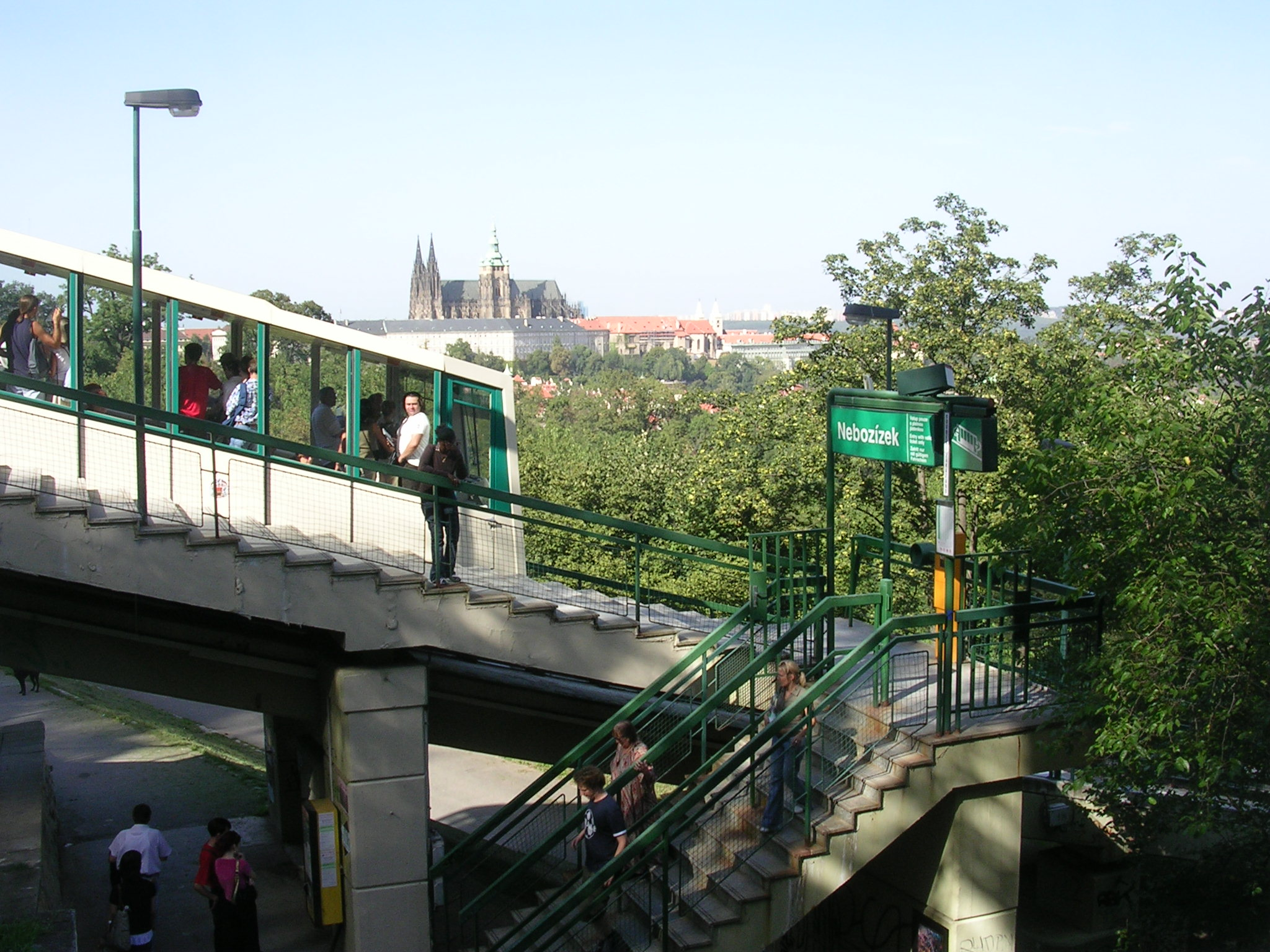 Praha, lanová dráha na Petřín, stanice Nebozízek